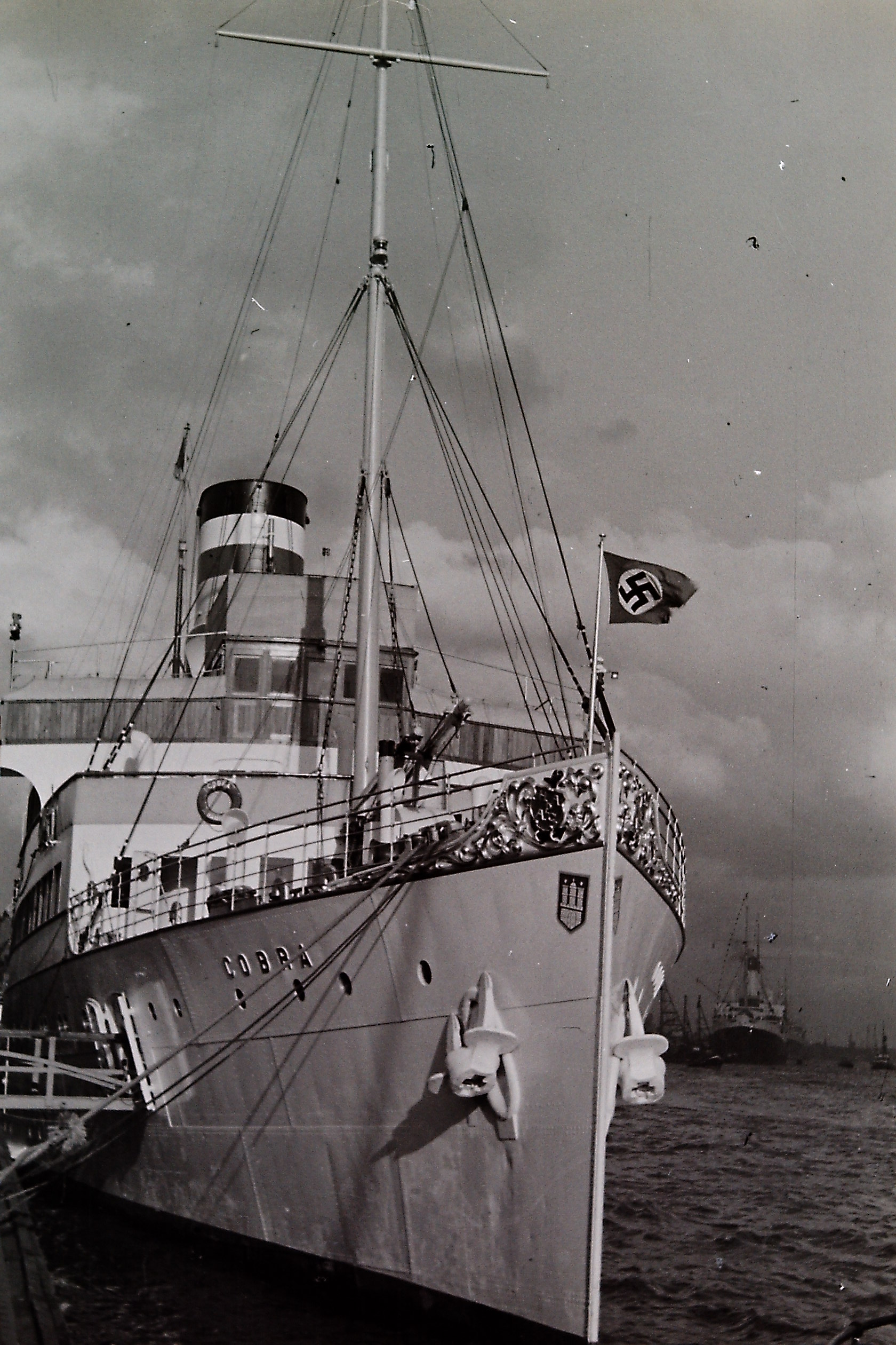 Die Cobra war ein Seebäderschiff der HAPAG, das im Zweiten Weltkrieg von der deutschen Kriegsmarine als Minenschiff eingesetzt wurde und im August 1942 verloren ging. Foto von Lothar Hallecker 1933 im Hamburger Hafen